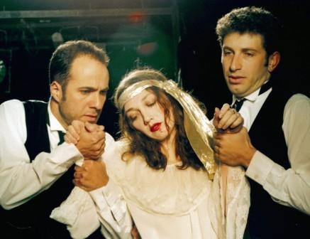 רוזנקרנץ וגילדנשטרן מתים-מארק איווניר,יבגניה דודינה,דרור קרן